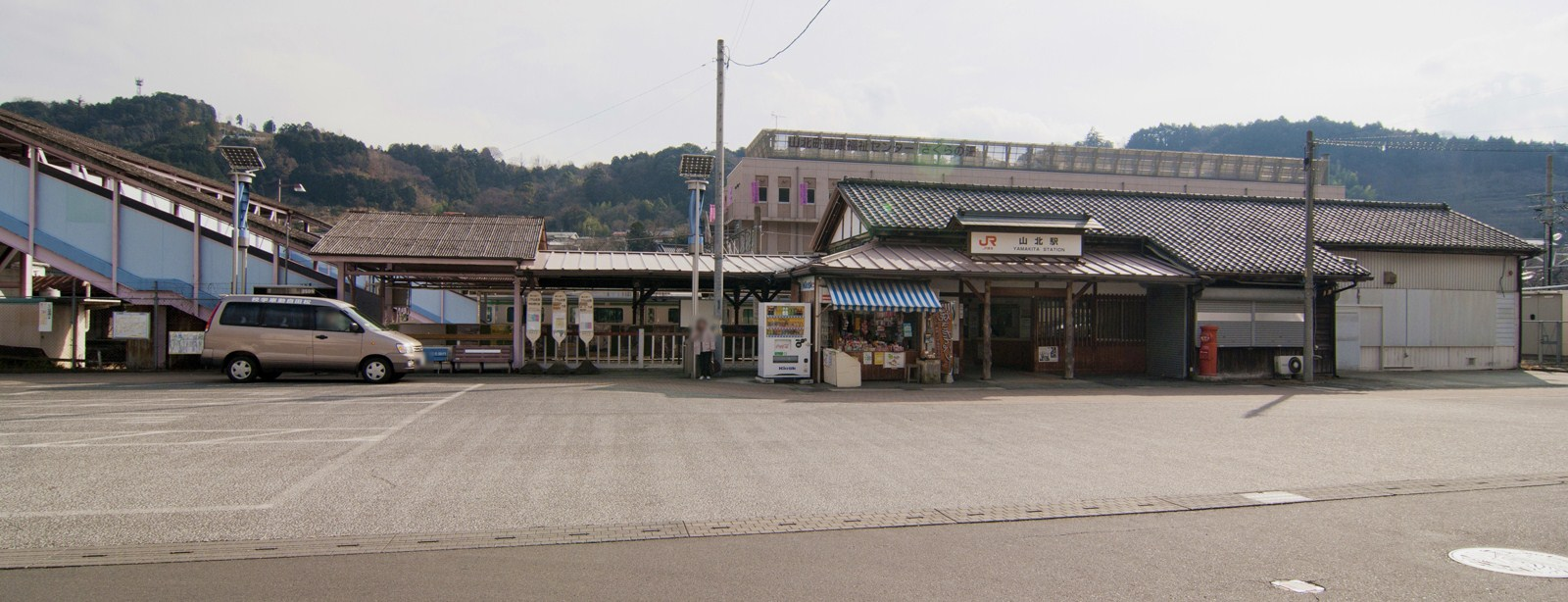 東海旅客鉄道御殿場線山北駅